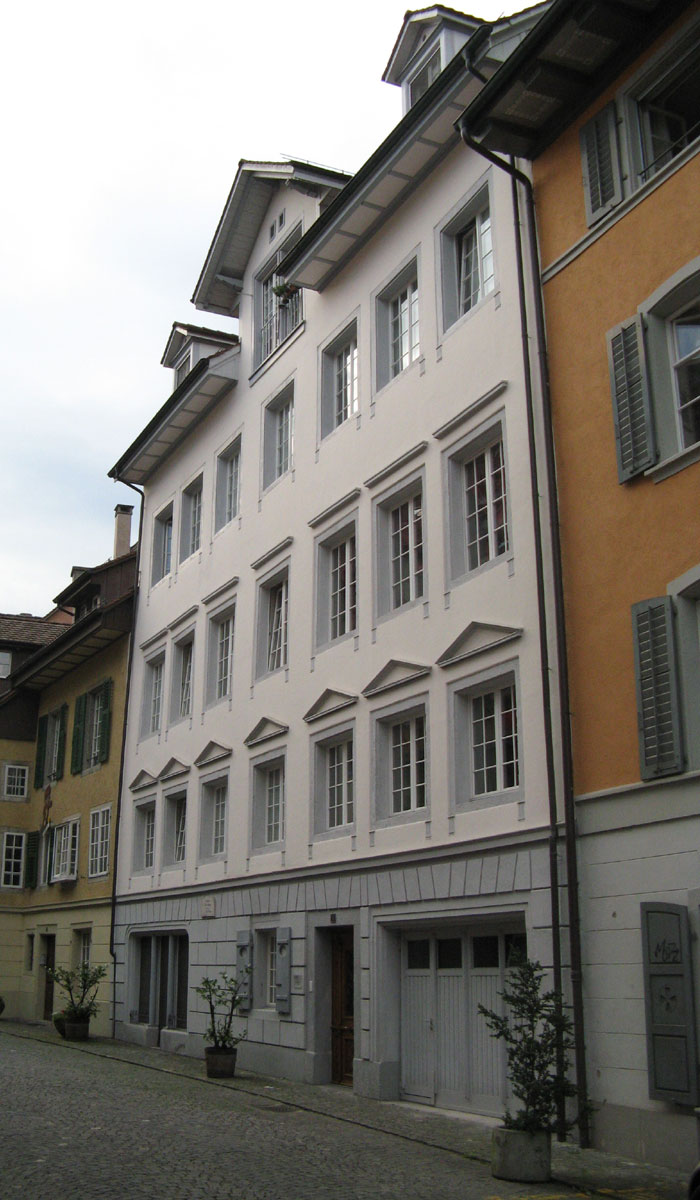 Haus Antonigasse 14, hier lebte der französische Prinz Louis-Philippe im Exil